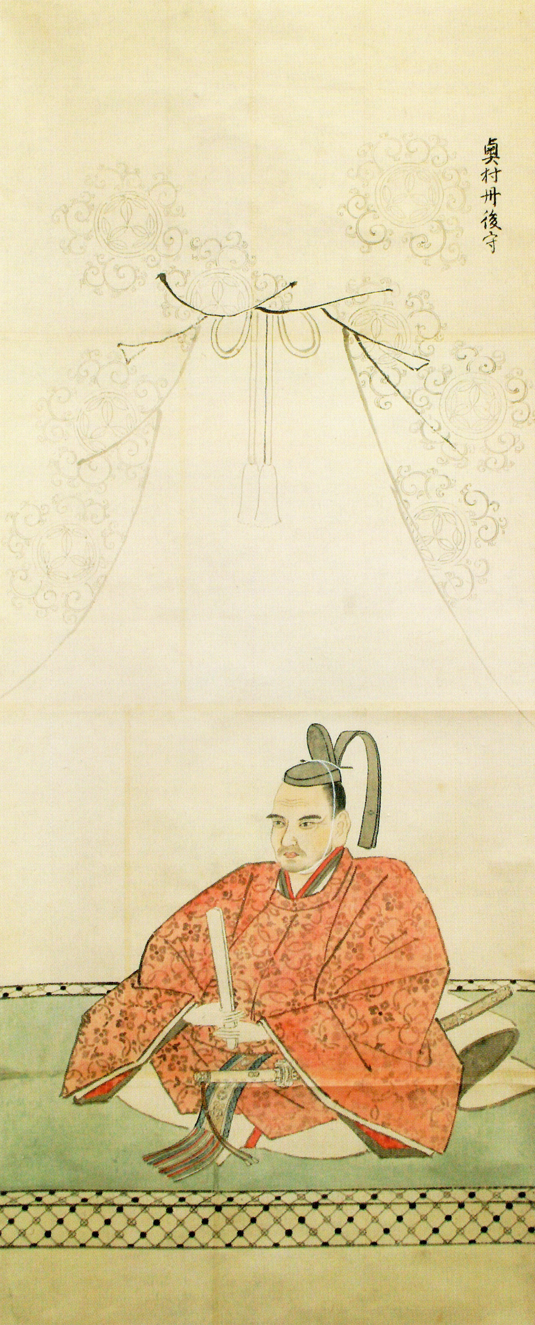 奥村栄実の肖像。